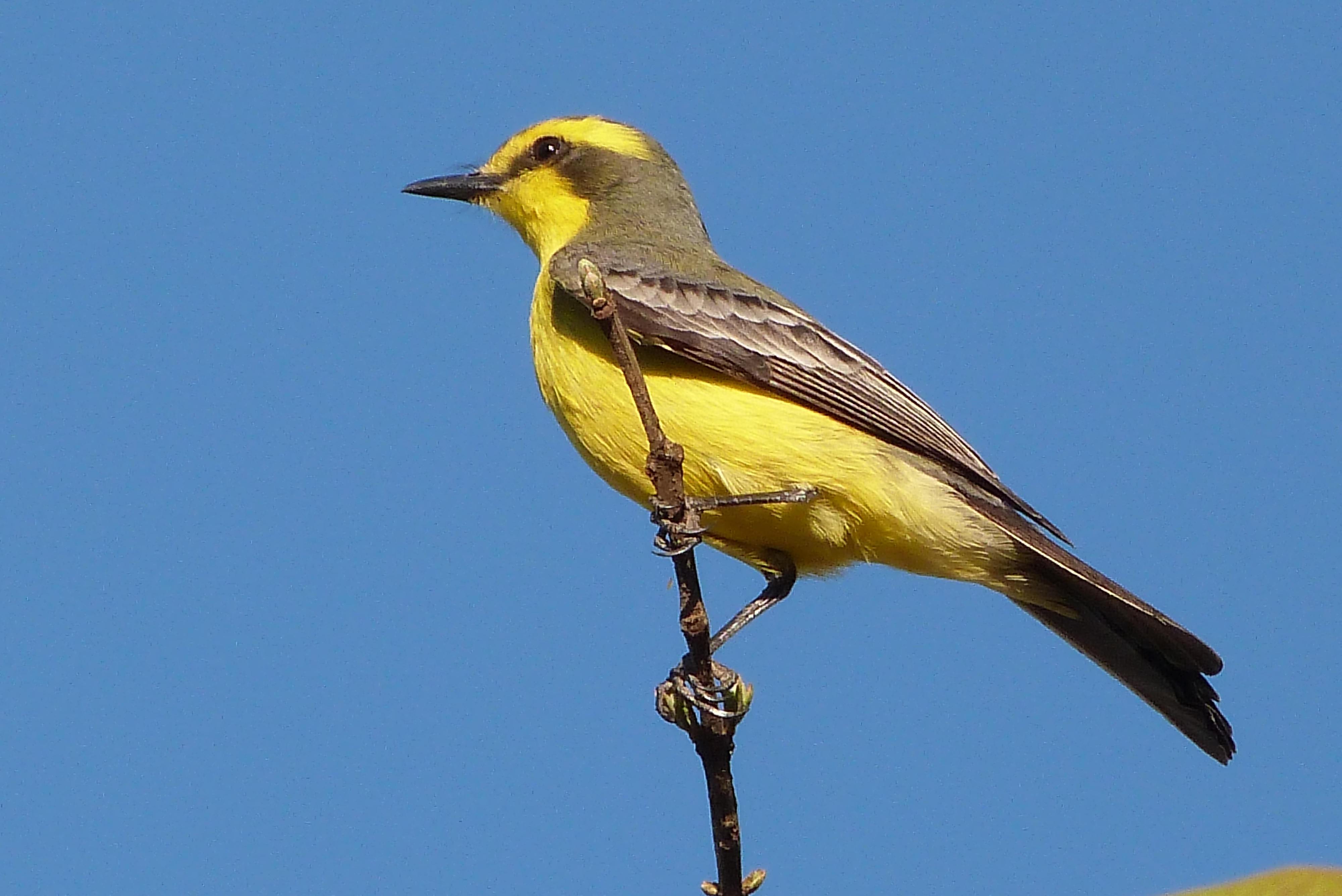 Foto tirada em Entre Rios - MG